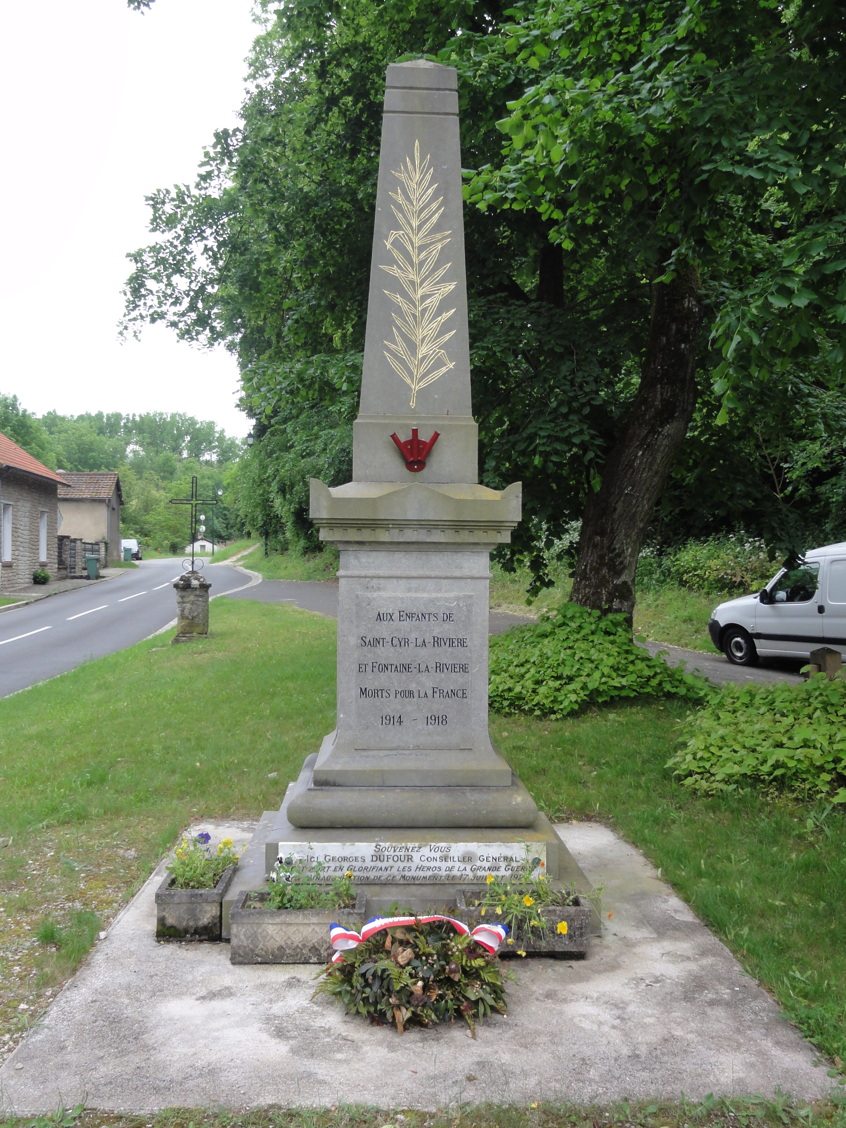 Saint-Cyr-la-Rivière (Essonne) Monument aux morts des communes des Saint-Cyr-la-Rivière et de Fontaine-la-Rivière